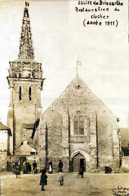 Restauration du clocher de Notre Dame de Brissarthe en 1911